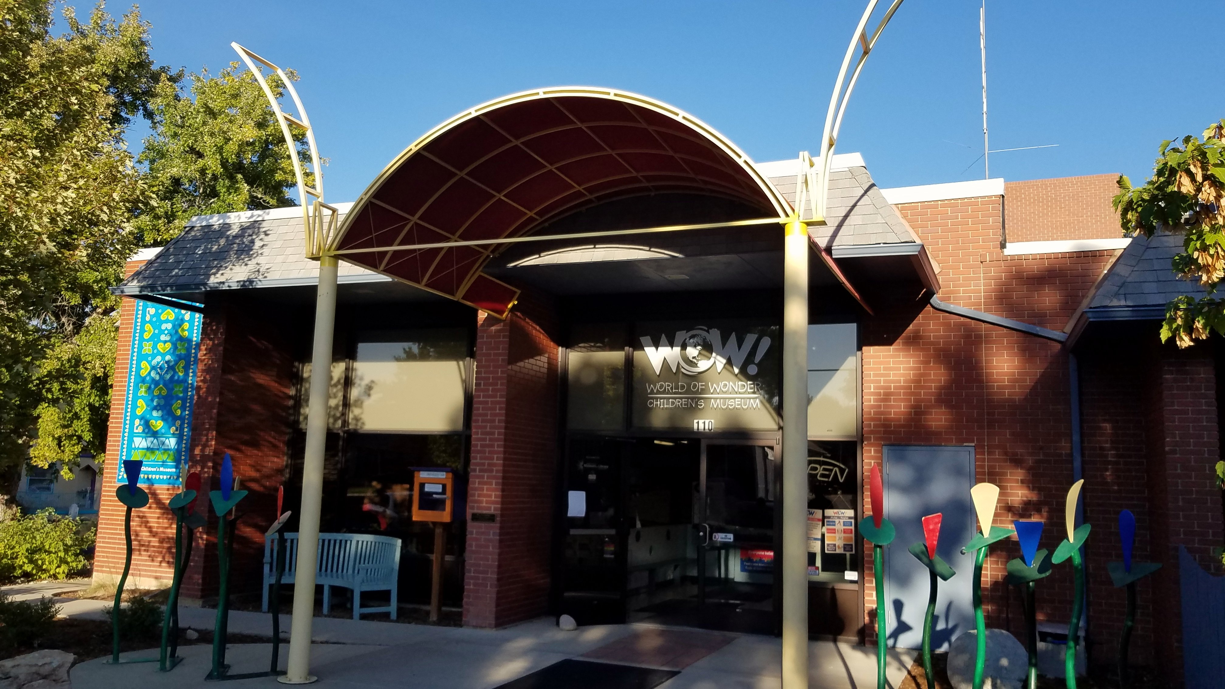 WOW Childrens Museum